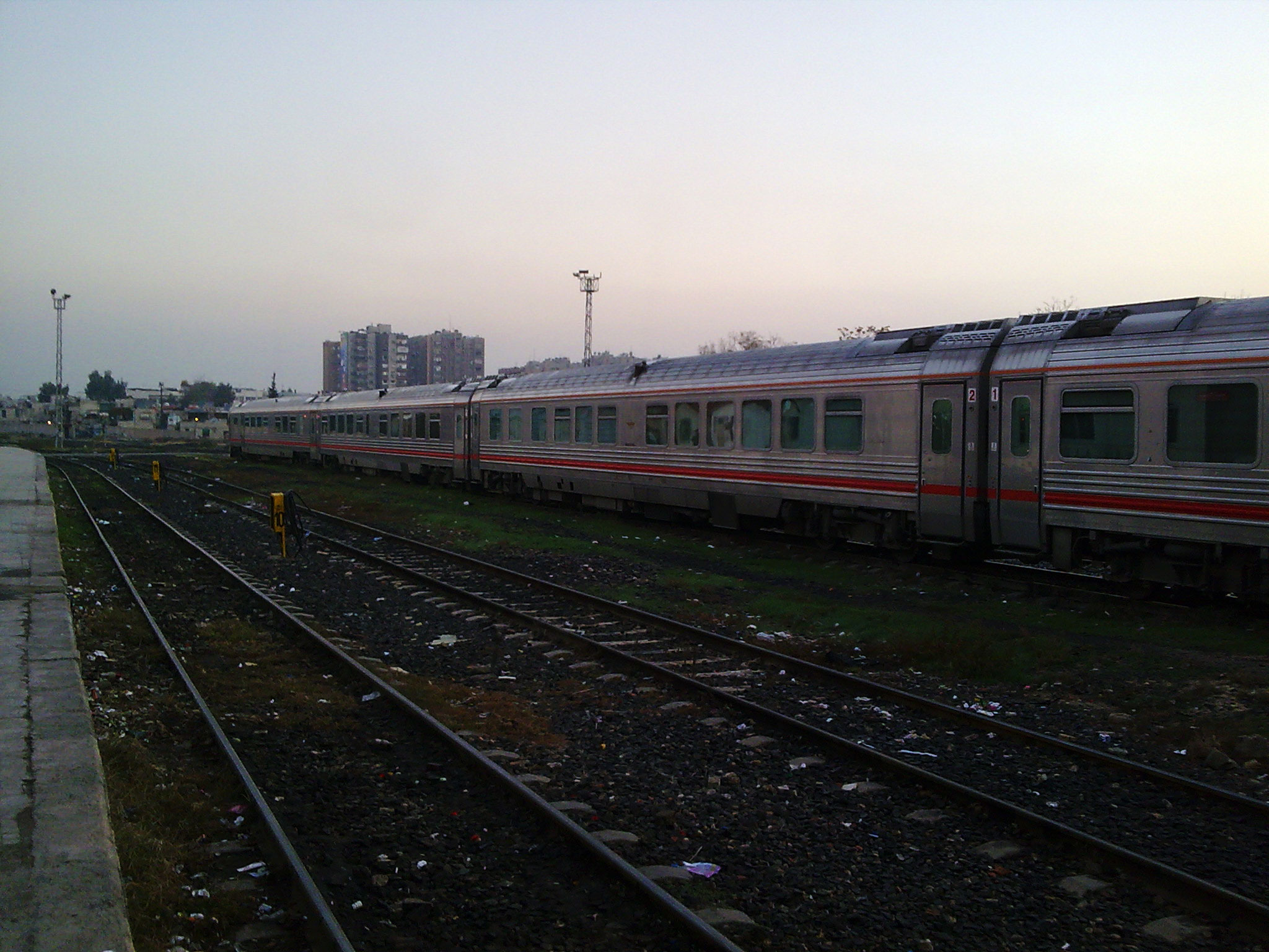 محطة قطارات القدم